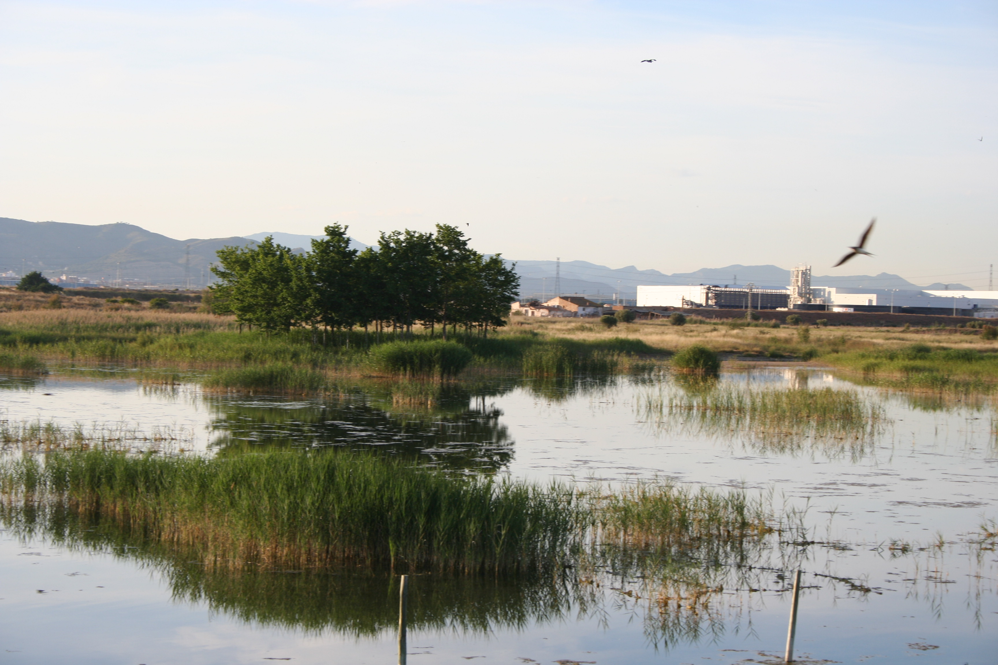 Laguna en la marjal del moro. Al fondo puede verse la ampliación del poligono industrial de sagunto.